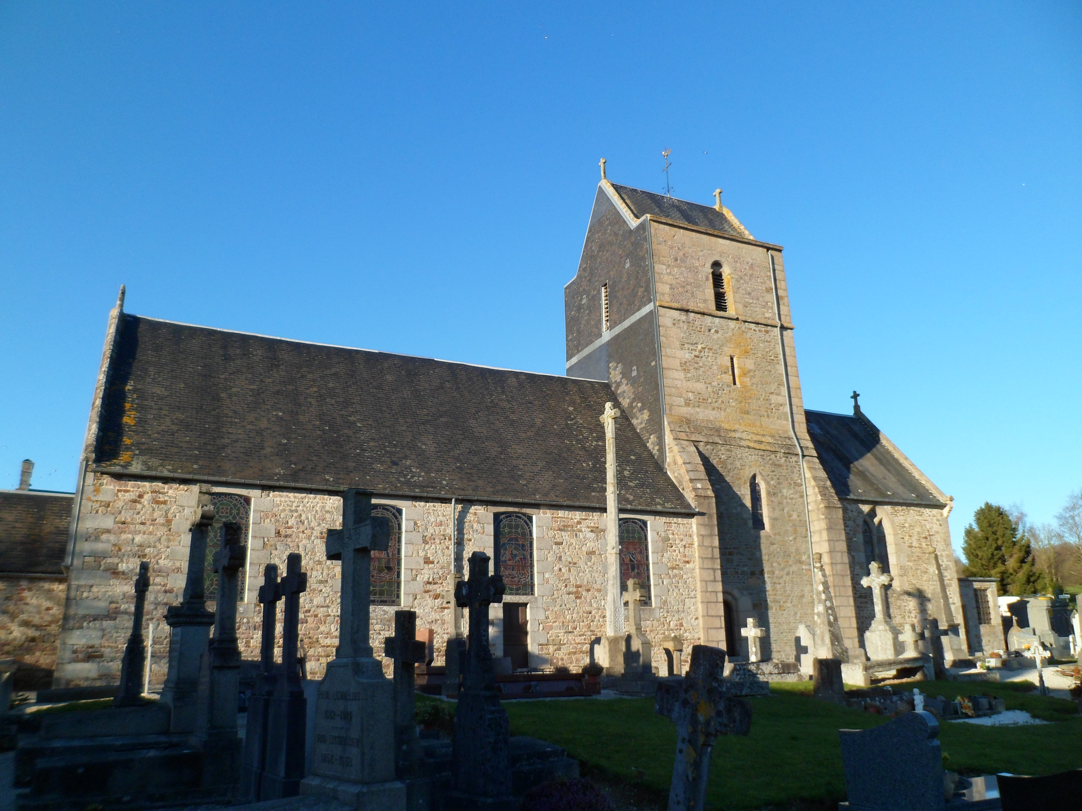 Église Saint-Vigor de Saint-Vigor-des-Monts. La croix du cimetière est munie de trois séries de quatre bubons et d'une inscription.